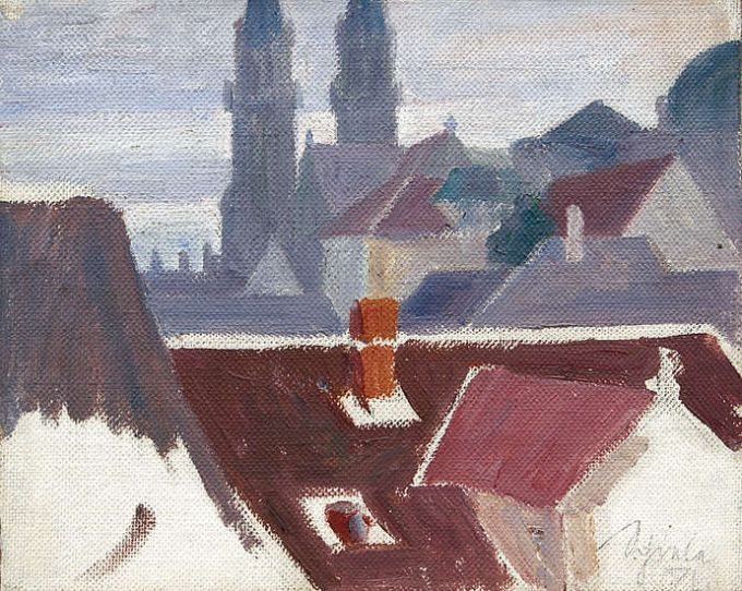 Klosterneuburg